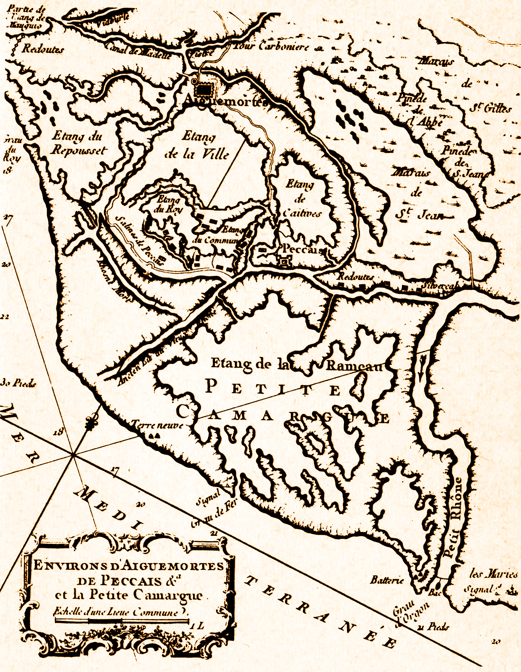 Aigues-Mortes, les salins de Peccais et la Petite Camargue Gravure de Bellin 1764